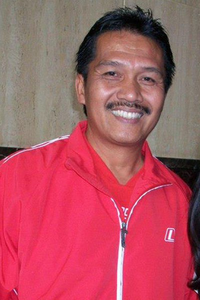 Jaya Hartono, pemain sepak bola legendaris Indonesia yang diturunkan pada pertandingan Indonesia Legend vs. AC Milan Glorie di Jakarta tahun 2011